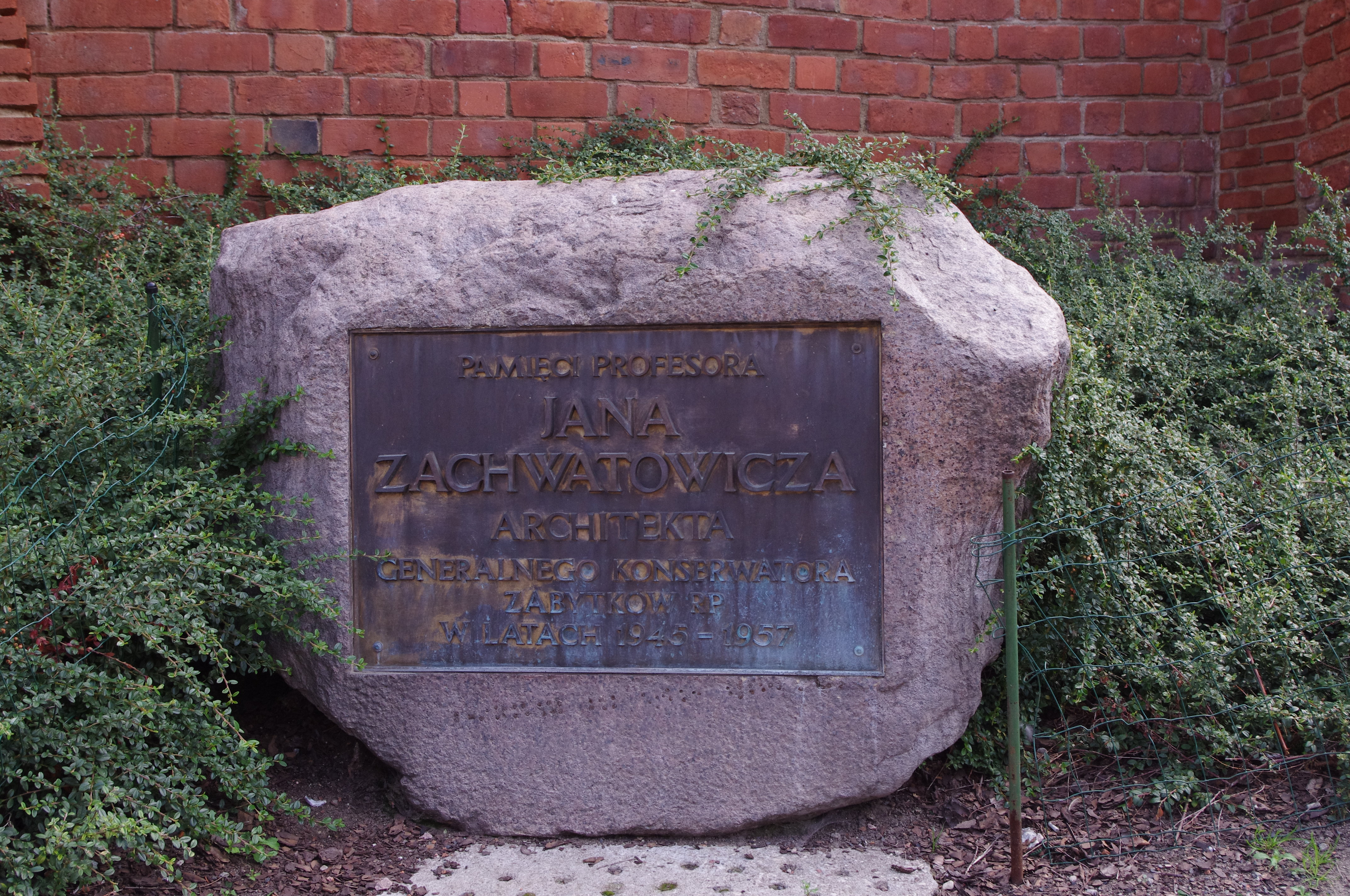 Kamień upamiętniający Jana Zachwatowicza przy Barbakanie na warszawskim Starym Mieście